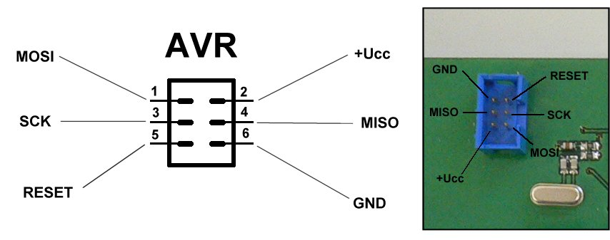 Ukázka rozmístění pinů ISP konektoru (plošný spoj).